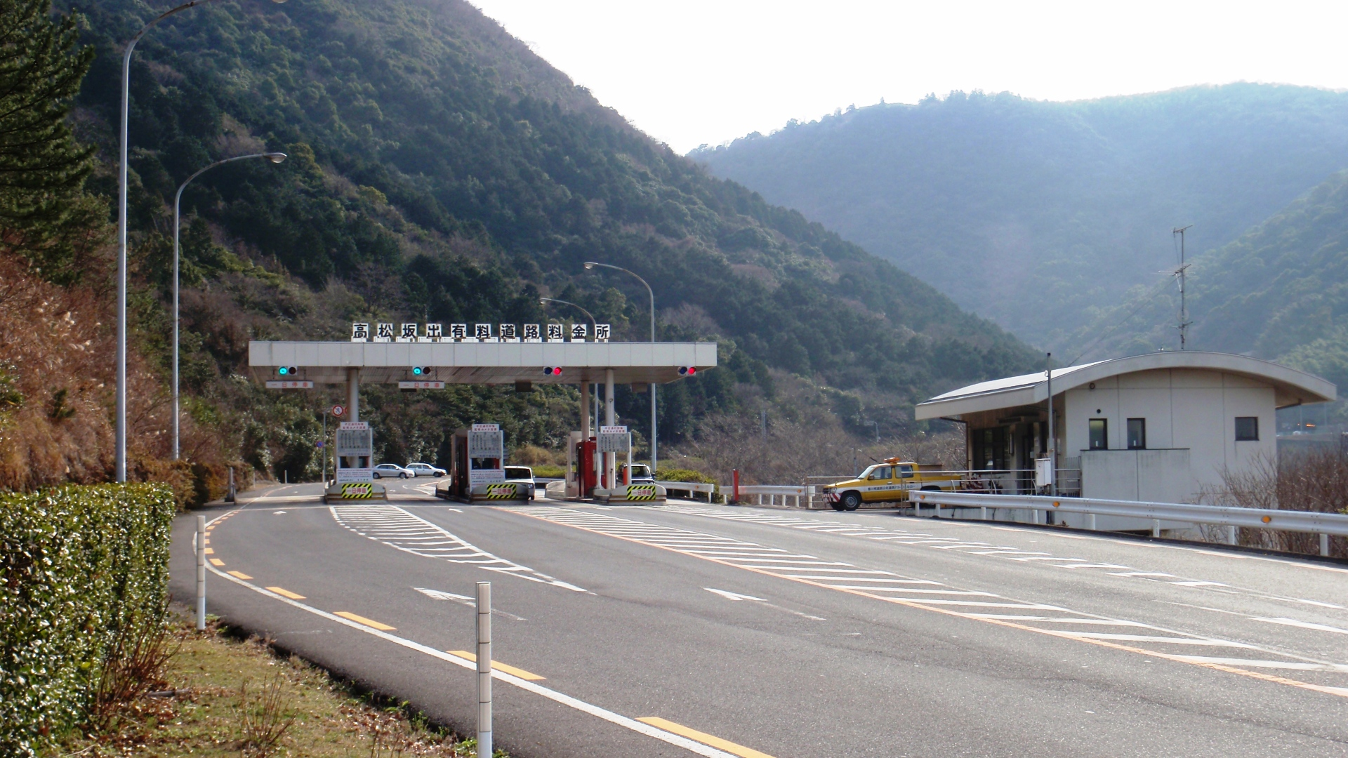 香川県高松市亀水町にあった高松坂出有料道路の料金所。2011年に道路の無料開放に伴い撤去。